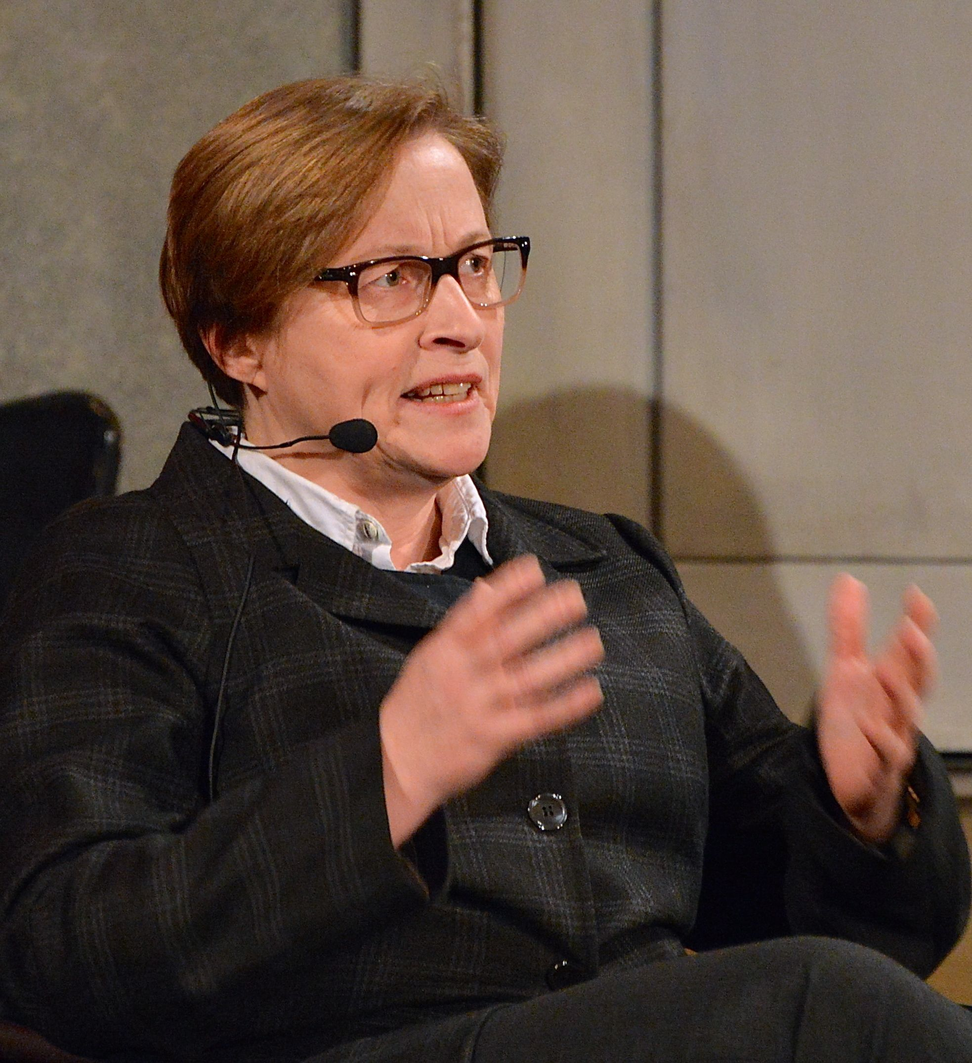 Gunilla Röör i ett framträdande under Strindbergsårets sista dag, den 20 januari 2013 i Kulturhuset i Stockholm.